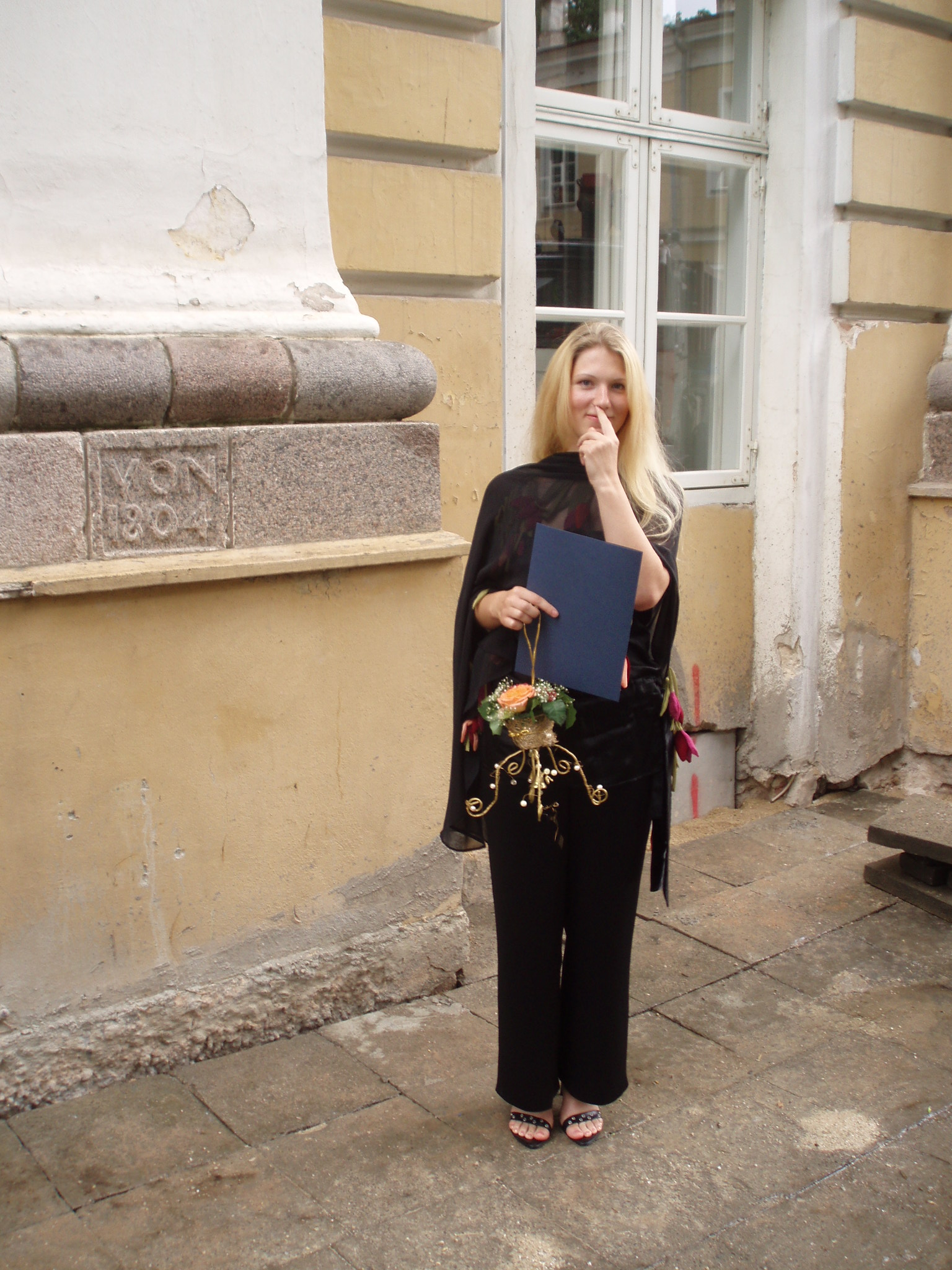 Nadežda Tšernobai bakalaureuseõppe lõpetamisel Tartu Ülikooli peahoone ees.Foto: Robert Treufeldt, 29. juuni 2007